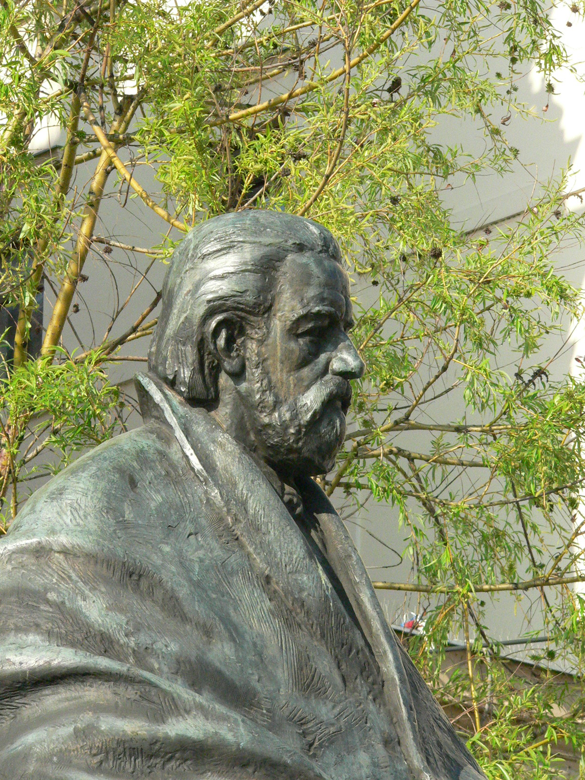 Smetana szobra, Prága